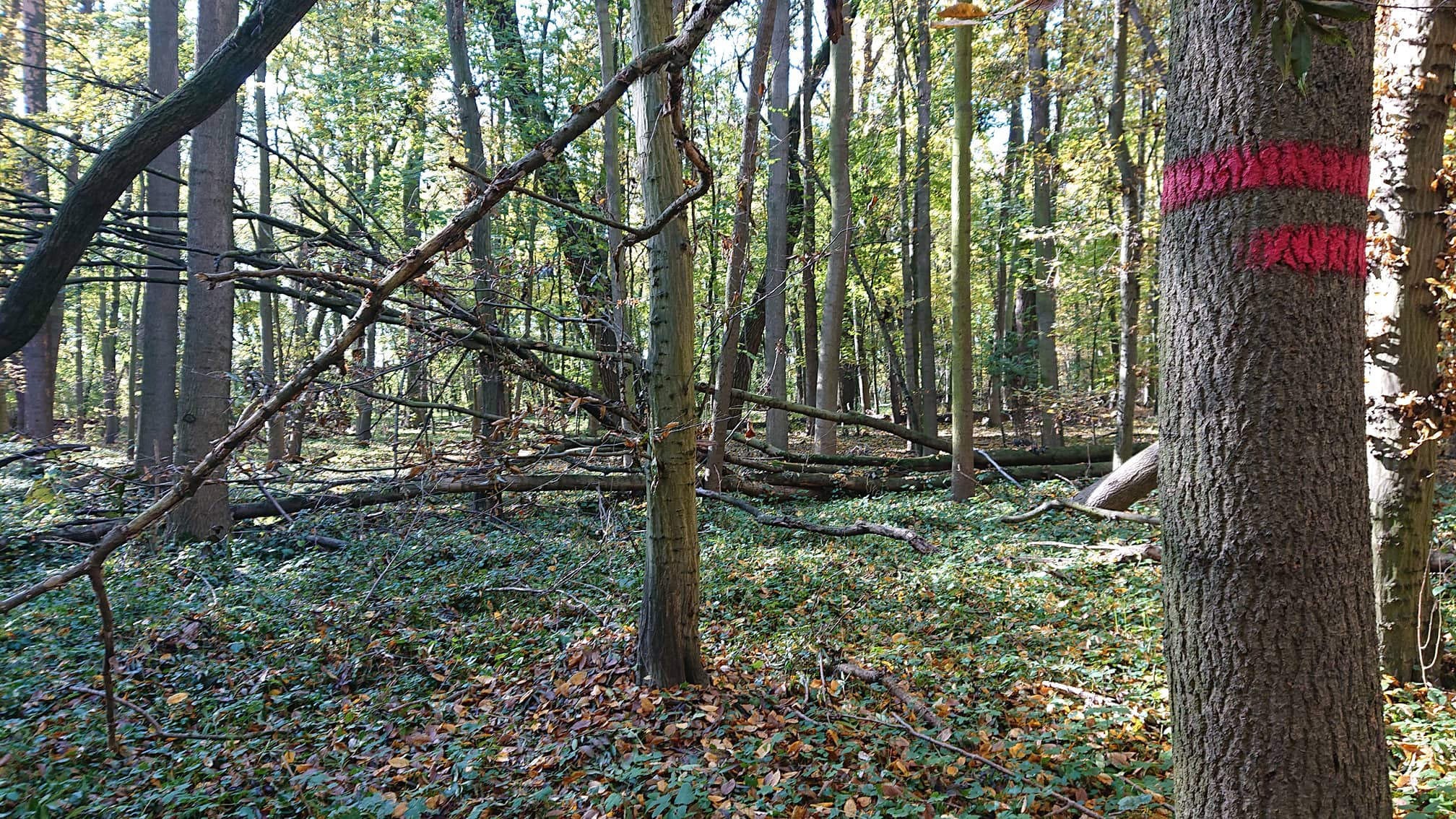 fotka přírodní památky Jiřina - lužní les